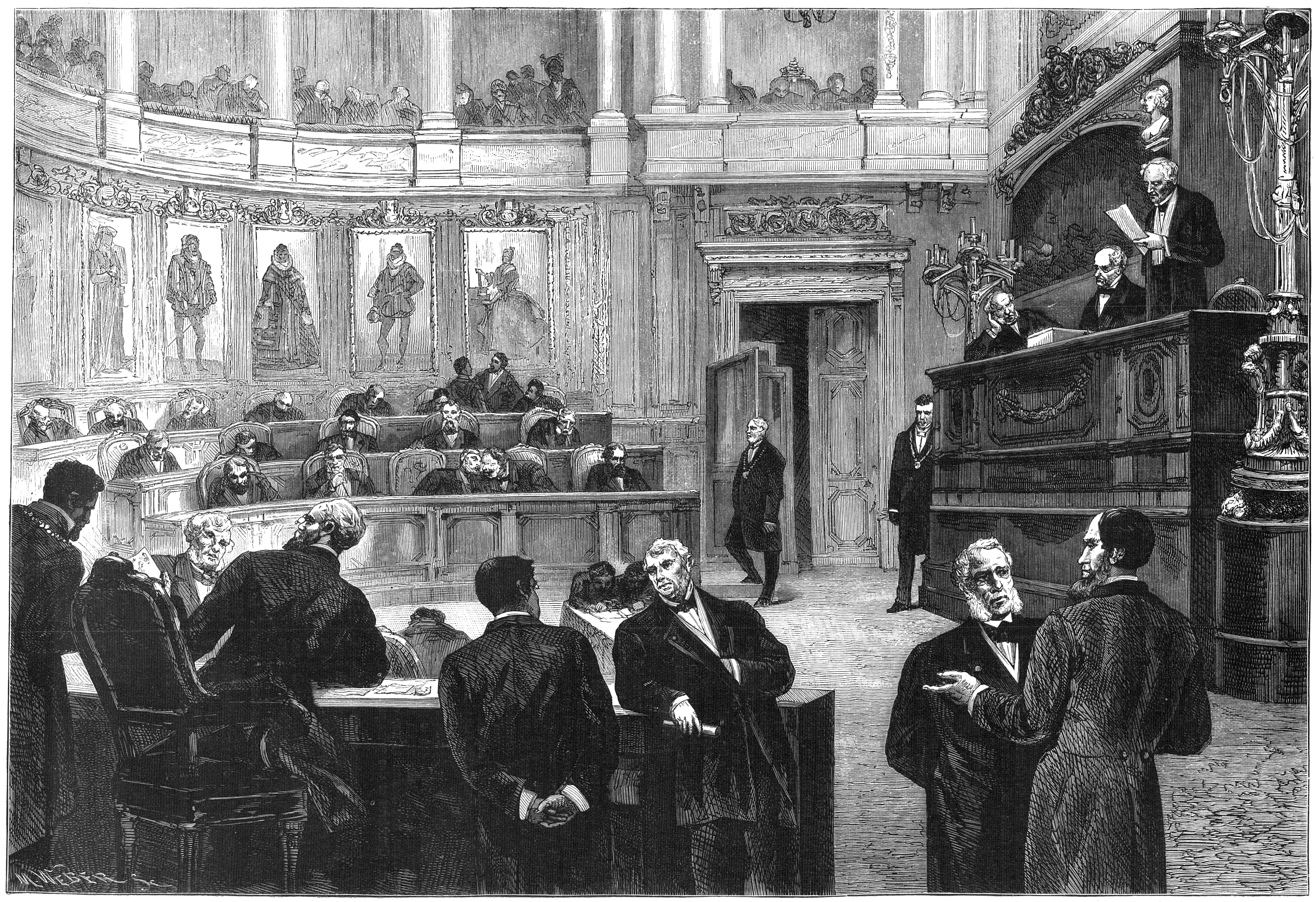 Le Sénat de Belgique en 1880.